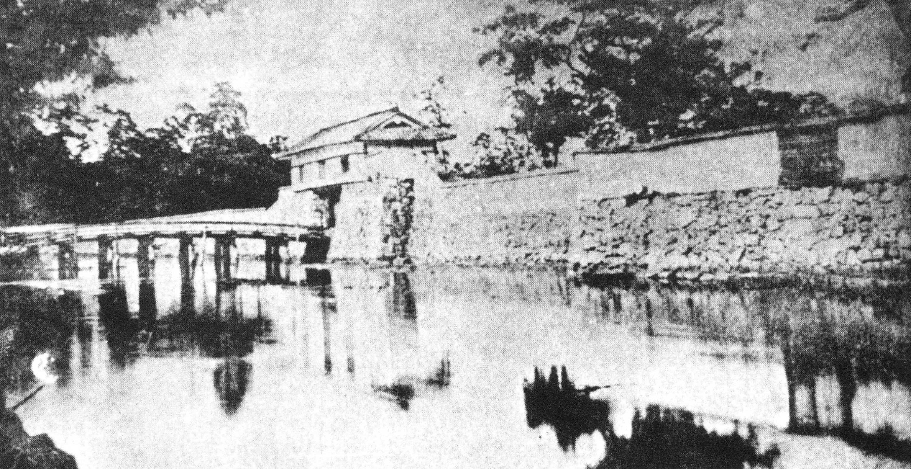 大手門と二の丸の塀